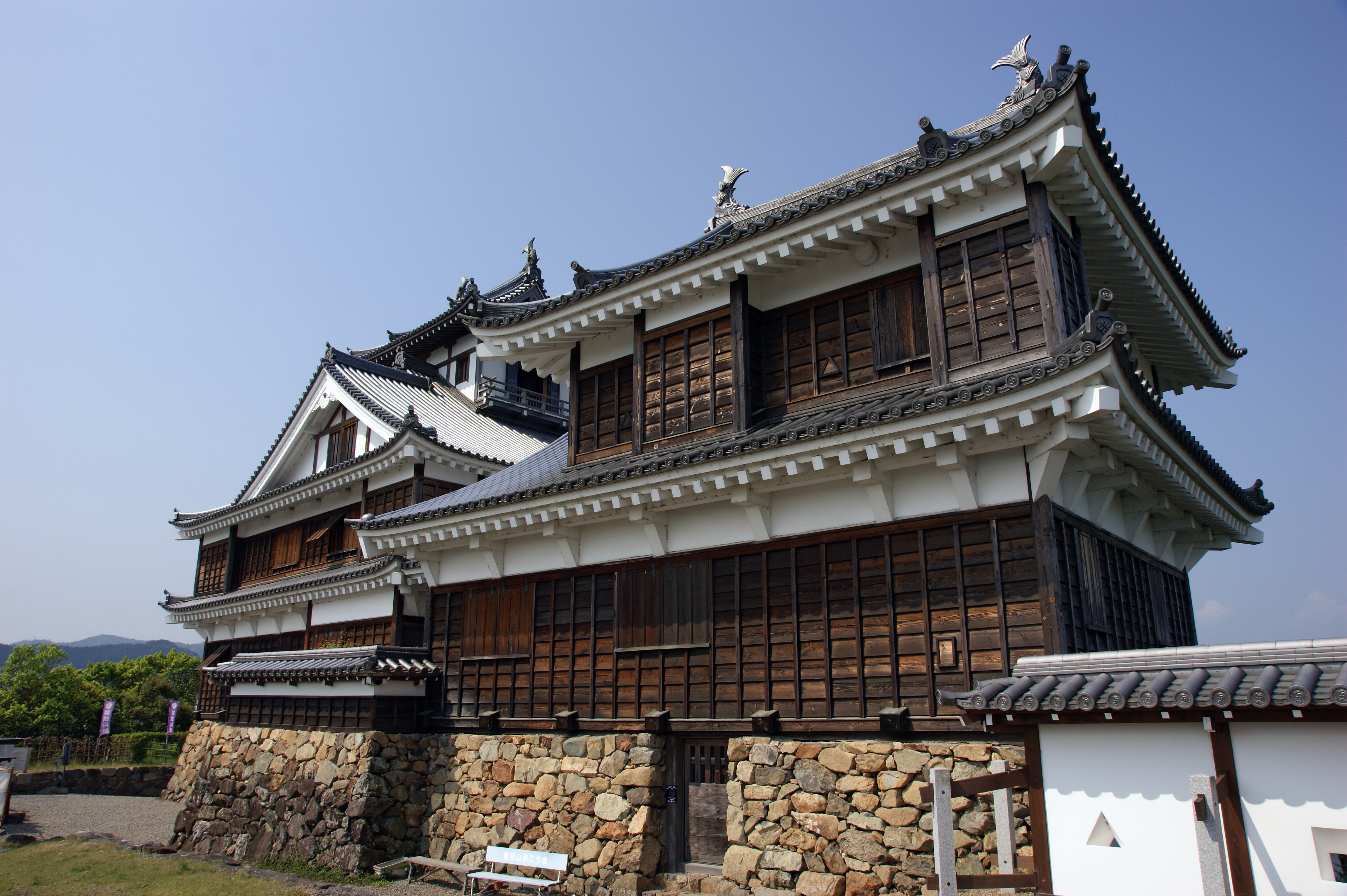 Fukuchiyama Castle in Fukuchiyama, Kyoto prefecture, Japan